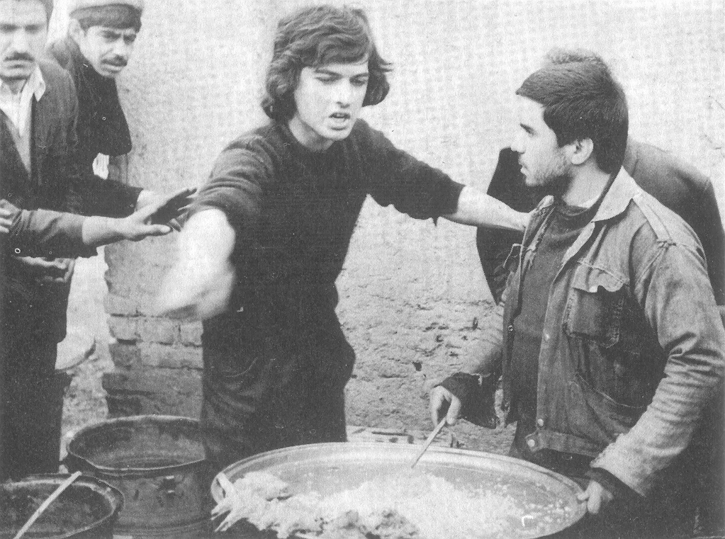 said kangarani "dayerh mina" (Film), 1973.